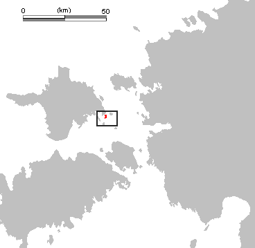 Kaevatsi laid